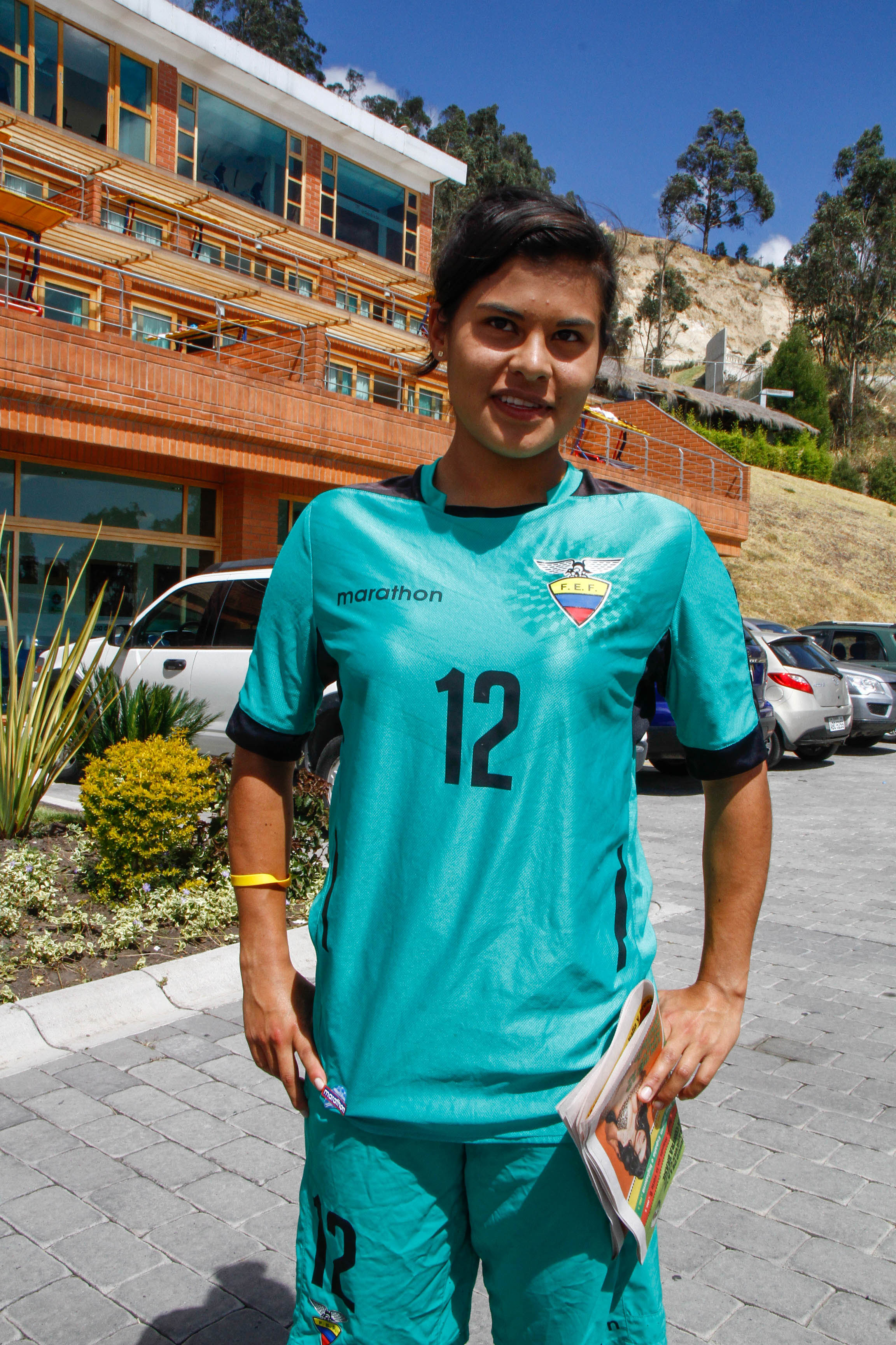 Quito, 08 sep (Andes).- En la casa de la selección se realizó la foto oficial de la Selección femenina de fútbol que participará en la Copa América a realizarse en varias ciudades del Ecuador del 11 al 28 de septiembre del 2014. En la gráfica la arquera Andrea Vera. Foto: Micaela Ayala V./Andes